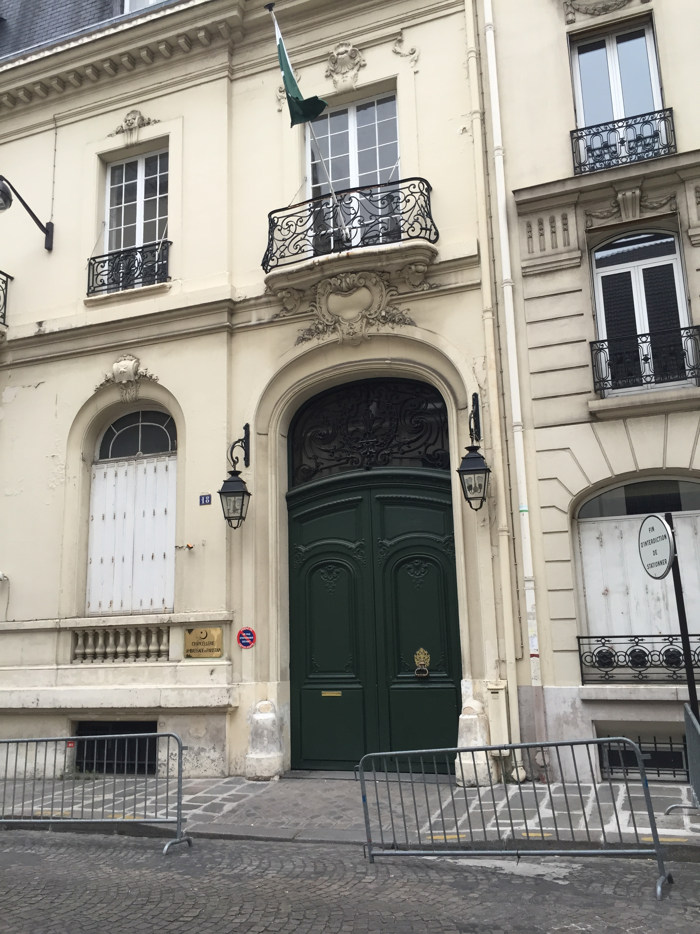 Ambassade pakistanaise à Paris - rue Byron.